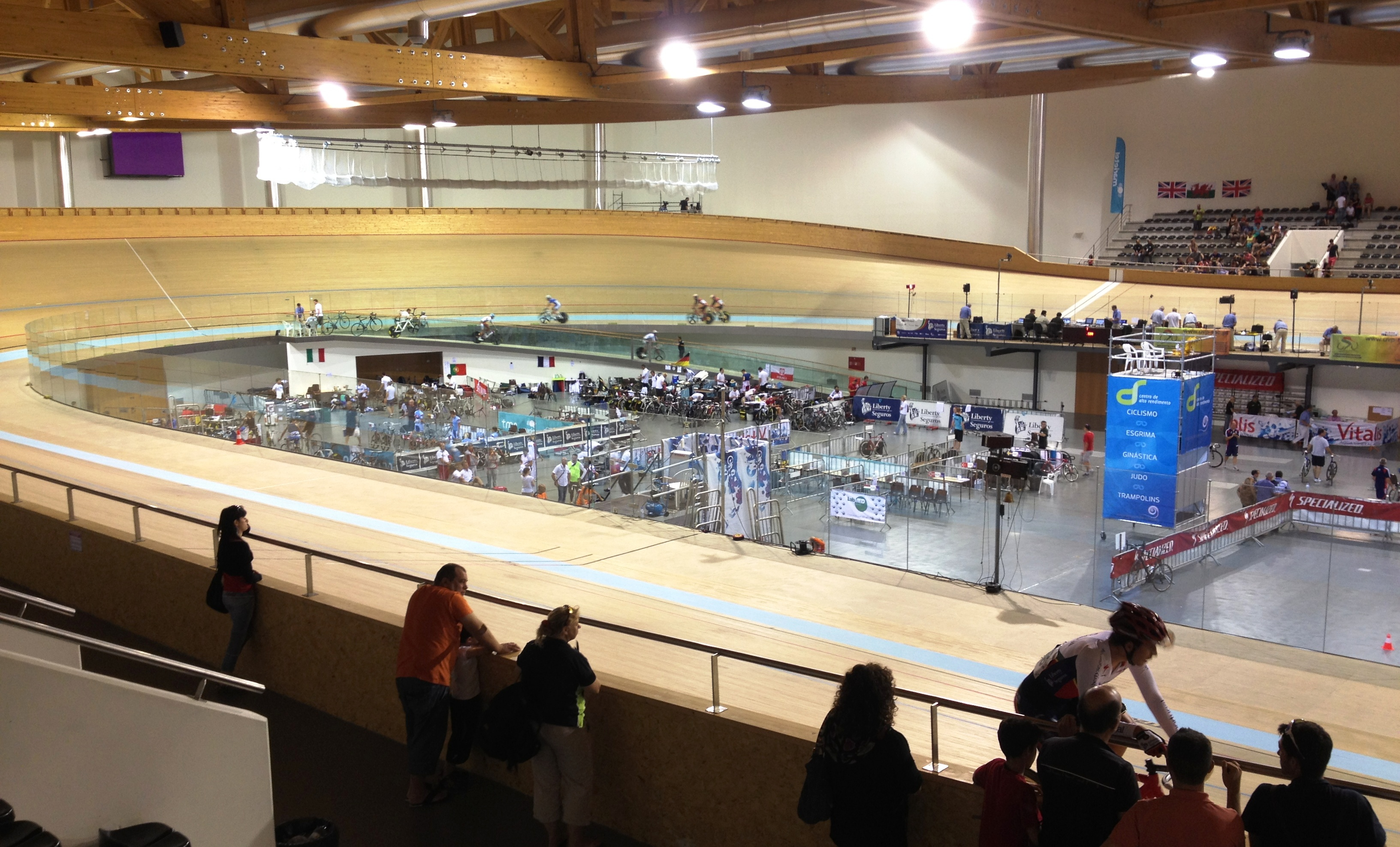 Radrennbahn in Anadia, Portugal